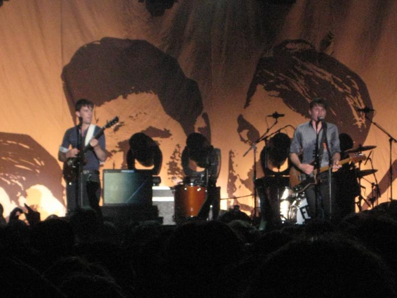 Franz Ferdinand @ Ferrara sotto le Stelle